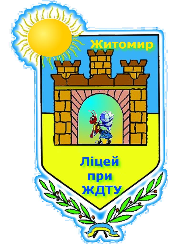 Офіційний герб ліцею при ЖДТУ